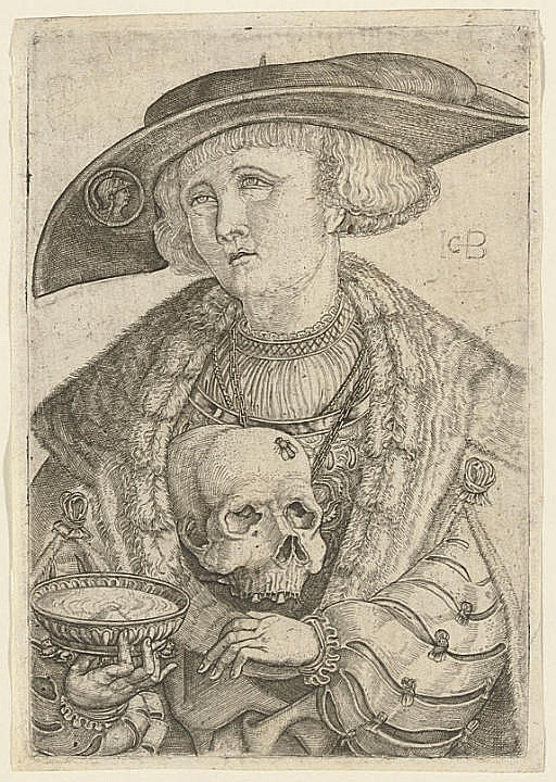 Jakob Binck, Autoportrait, vers 1520, estampe, 110 x 76 mm, collection particulière.